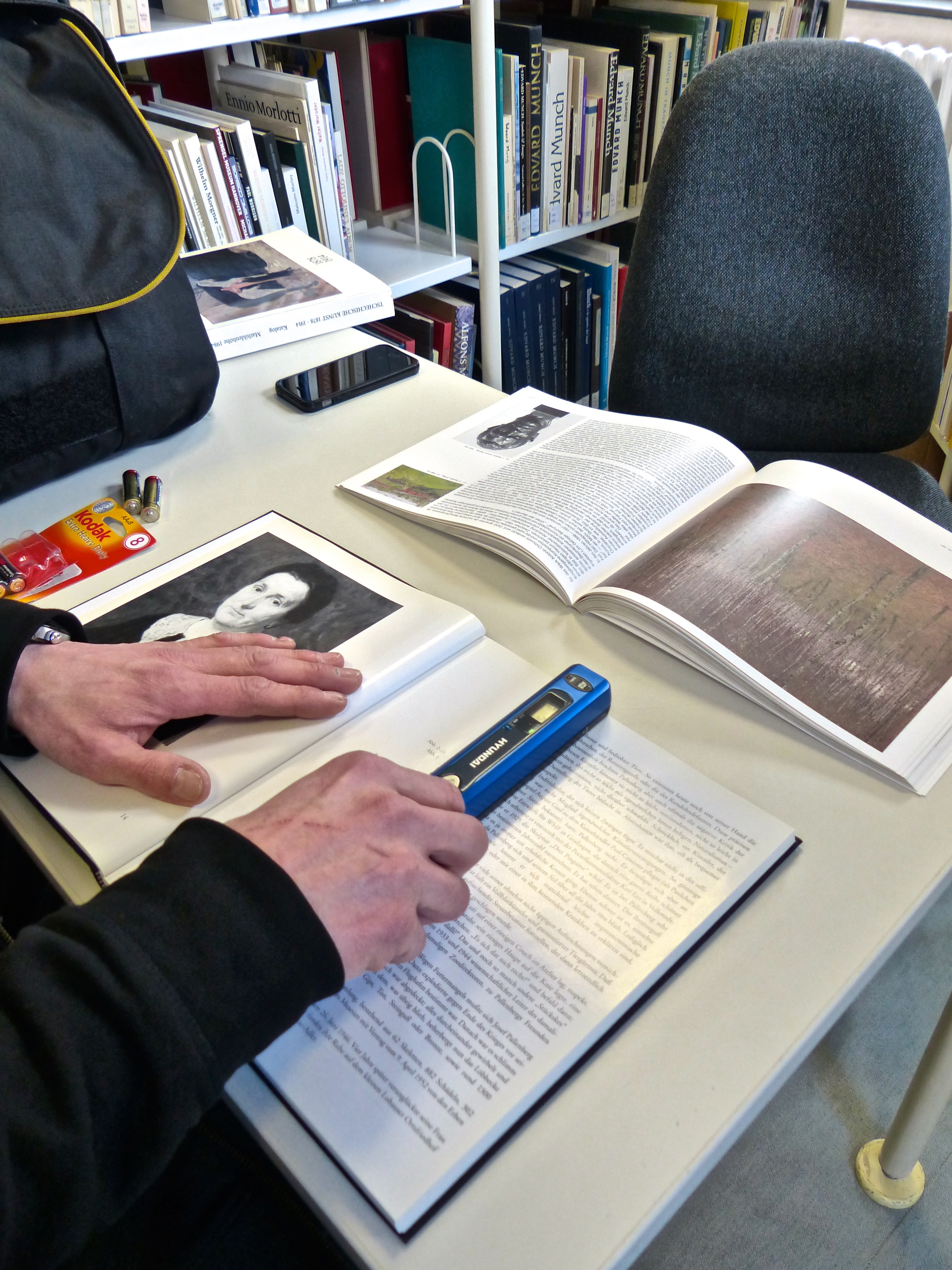 Bibliothek des von der Heydt-Museums während der Schreibwerkstadt: Scannen von Literatur mit einem Handscanner